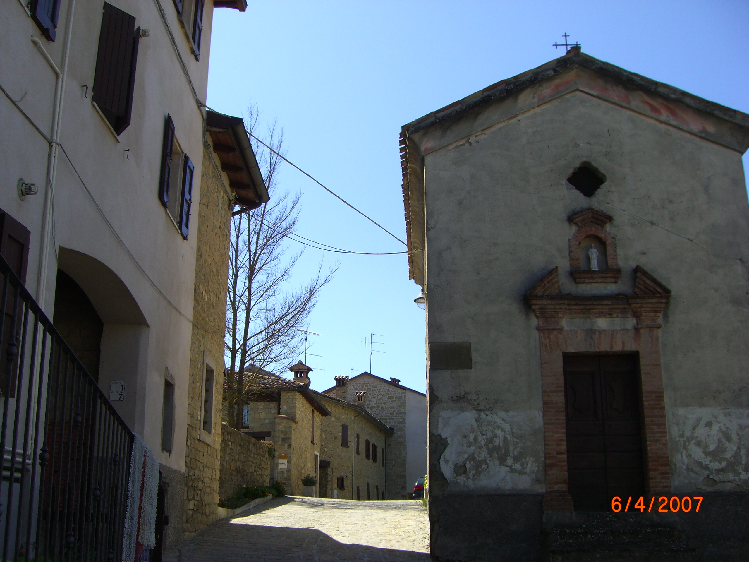 Autore: Manu Gino, Foto dell'Oratorio e della strada della frazione Mgonfia, Felina, Castelnovo ne'Monti (RE)